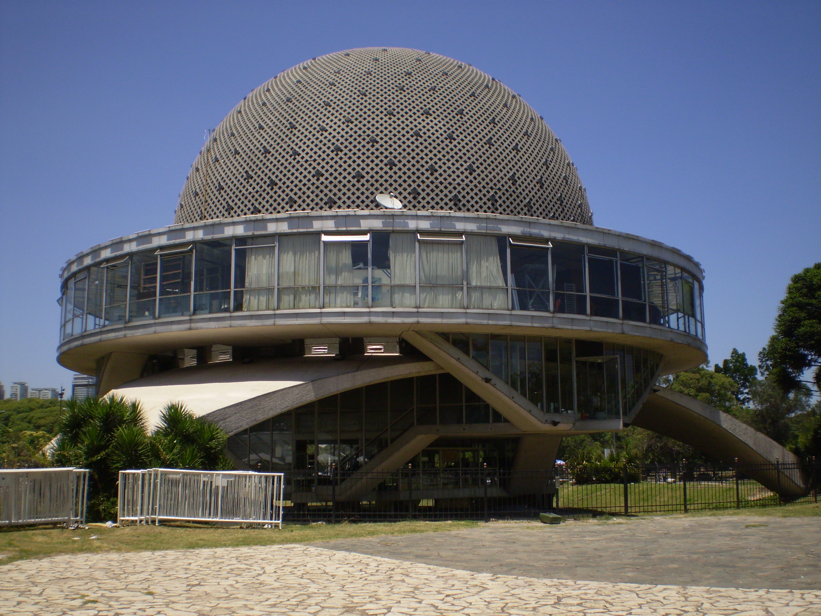 Planetario de la ciudad de Buenos Aires, Argentina